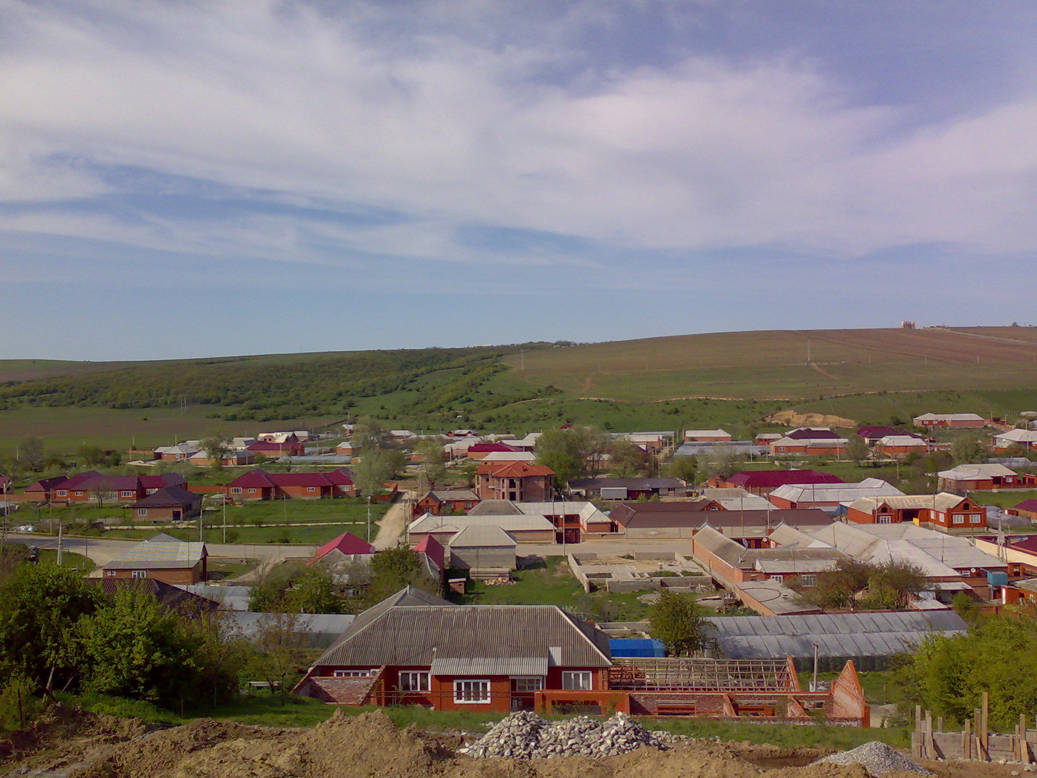 Хоси-Юрт